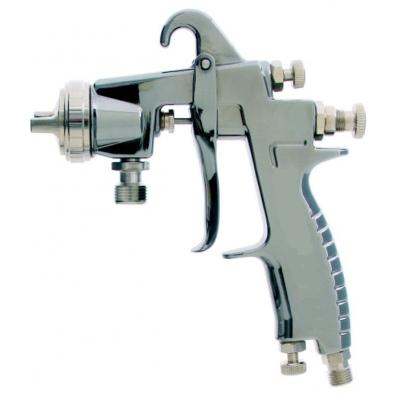 Pistola de pintura LVLP com sistema de sucção, regulagem de leque e fluxo de ar